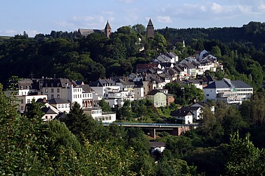 Blick auf Kyllburg vom Annenberg aus.